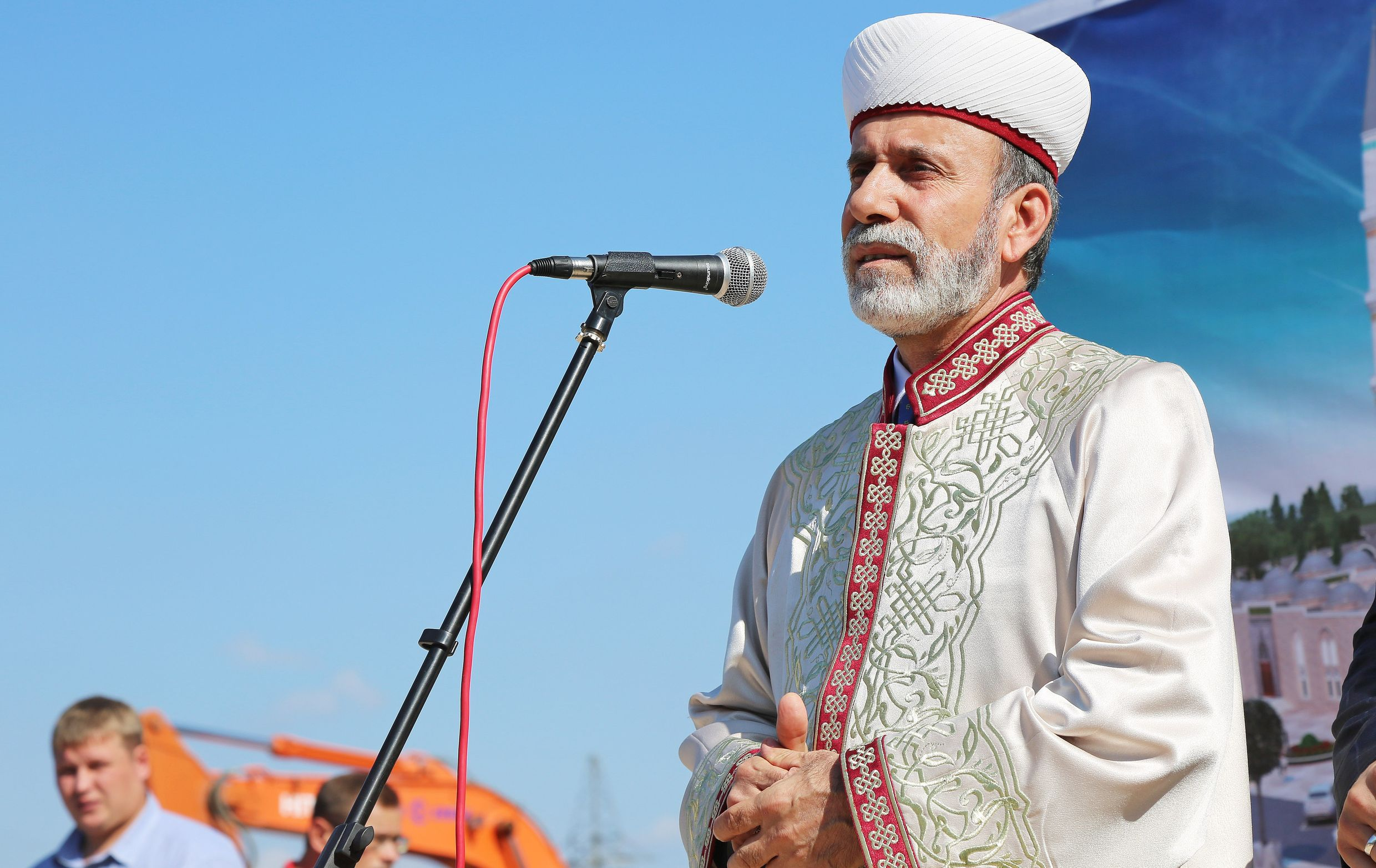 Муфтий Крыма в день начала строительства Соборной мечети